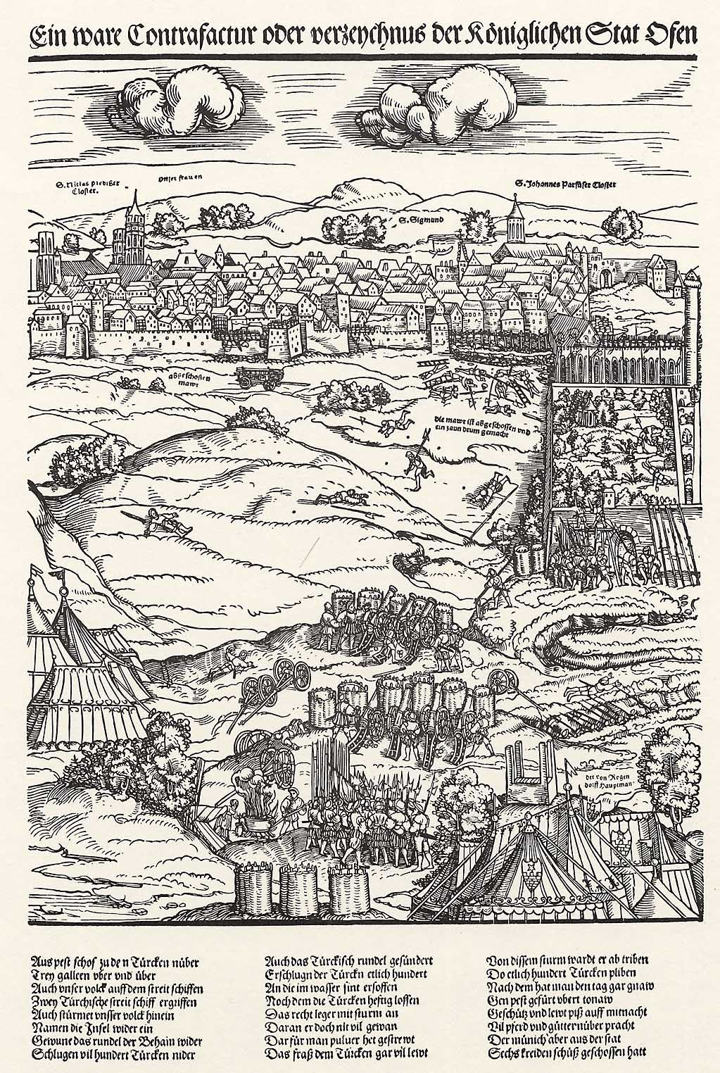 Siege of Buda (1541)